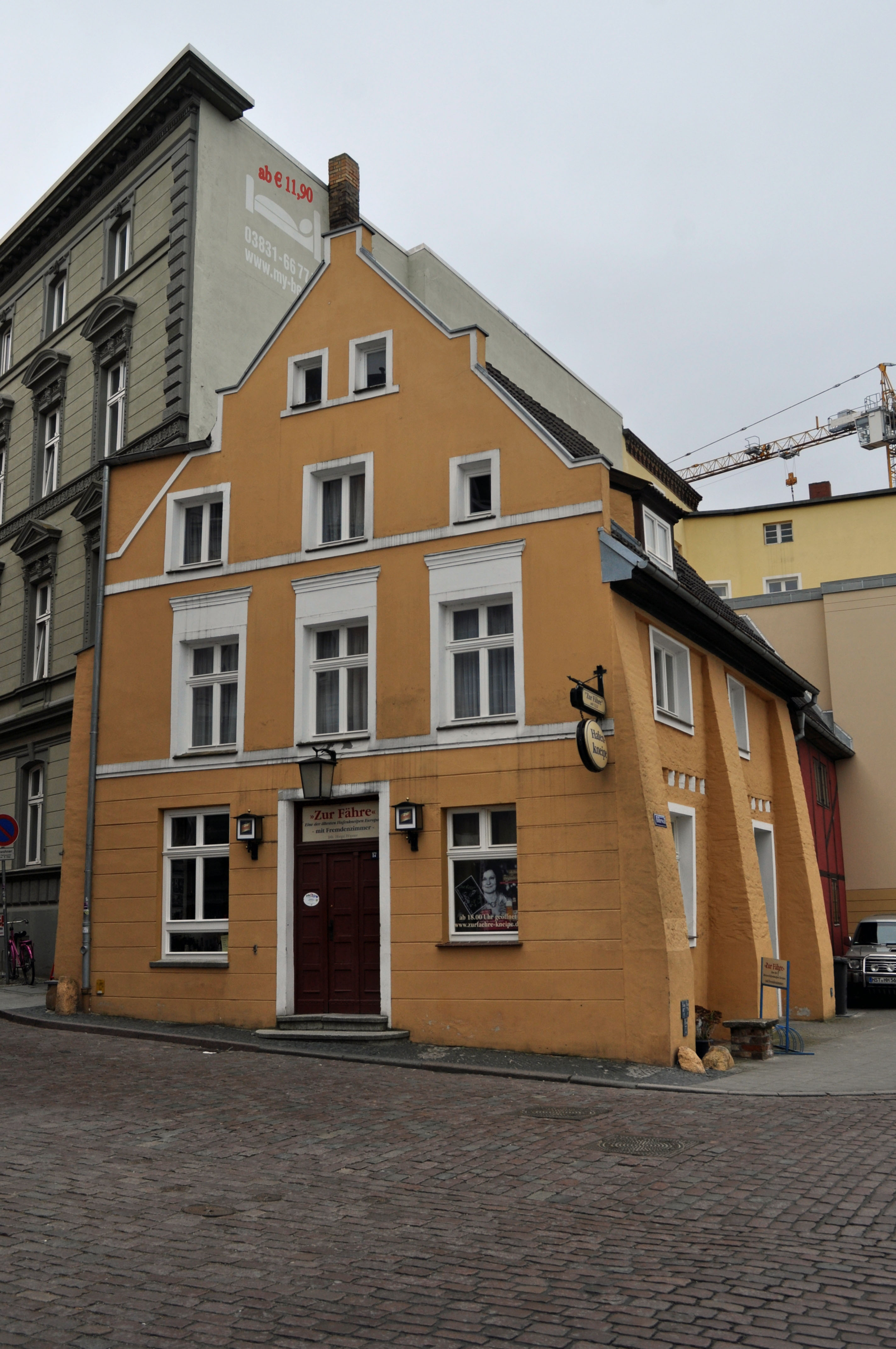 Gebäude bzw. Gebäudedetail in Stralsund. Straße und Hausnummer siehe Dateiname.